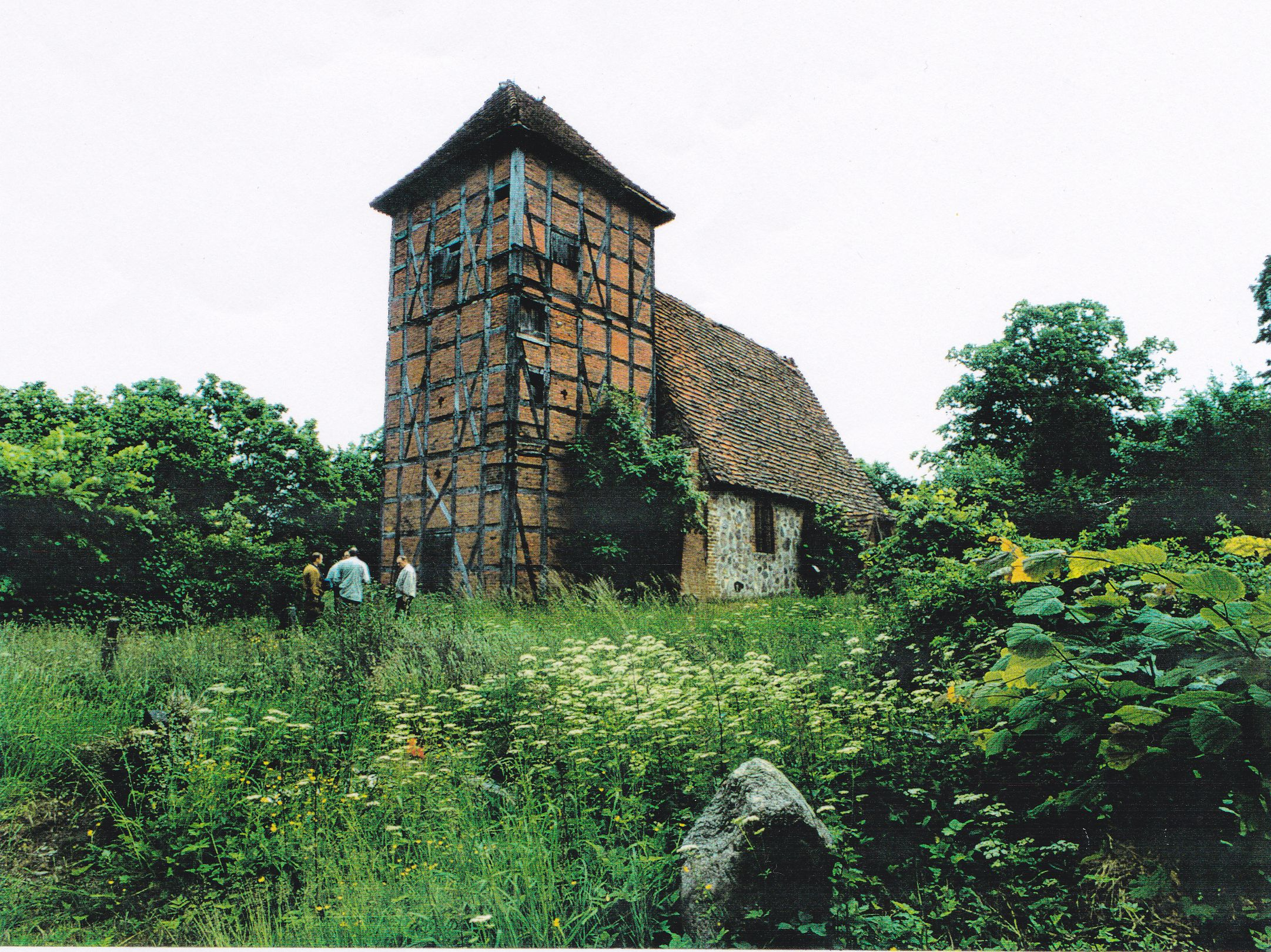 Dorfkirche Ruest vor der Renovierung